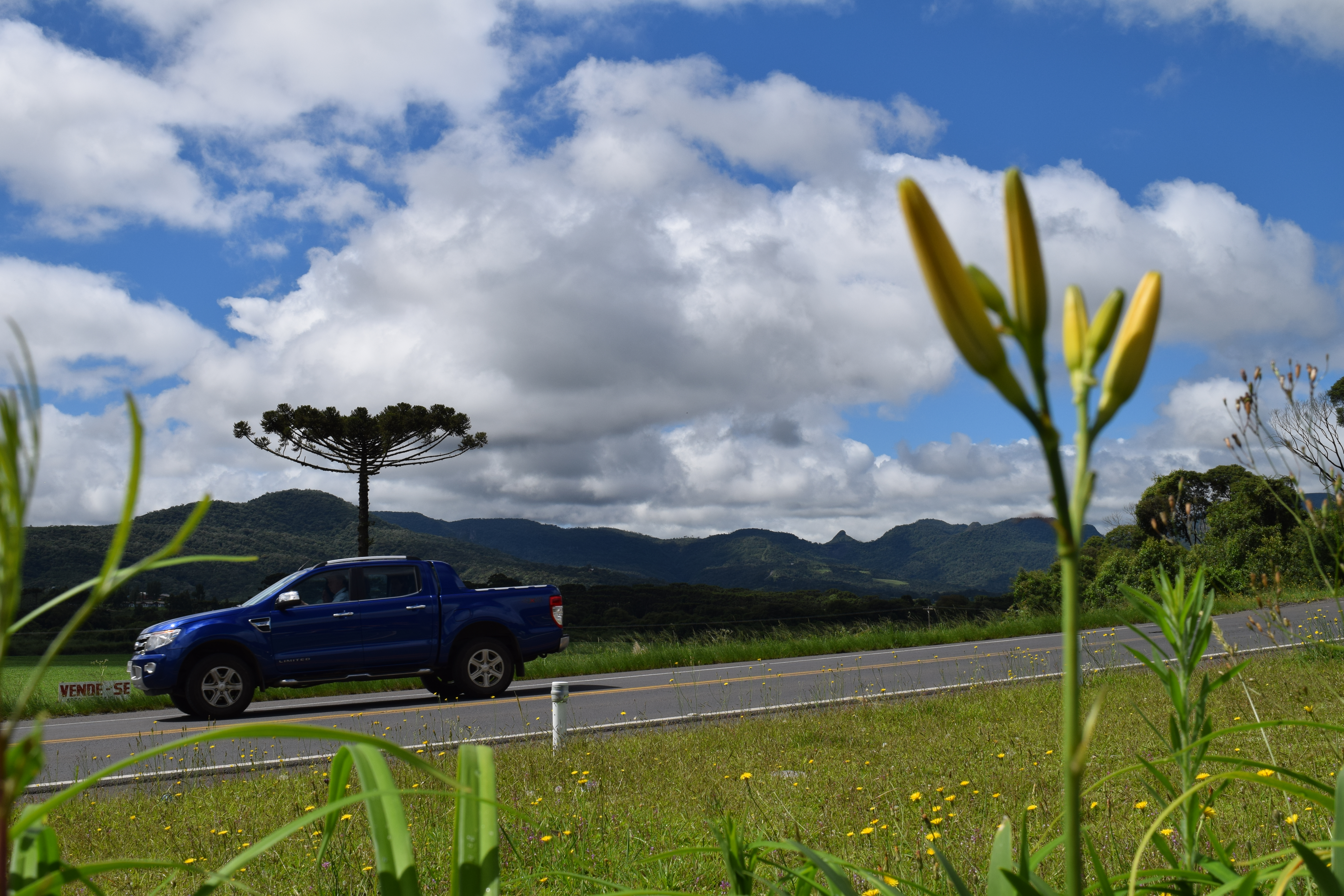 La carretera federal BR-282 en su paso por la ciudad de Bom Retiro, en plena serranía catarinense.